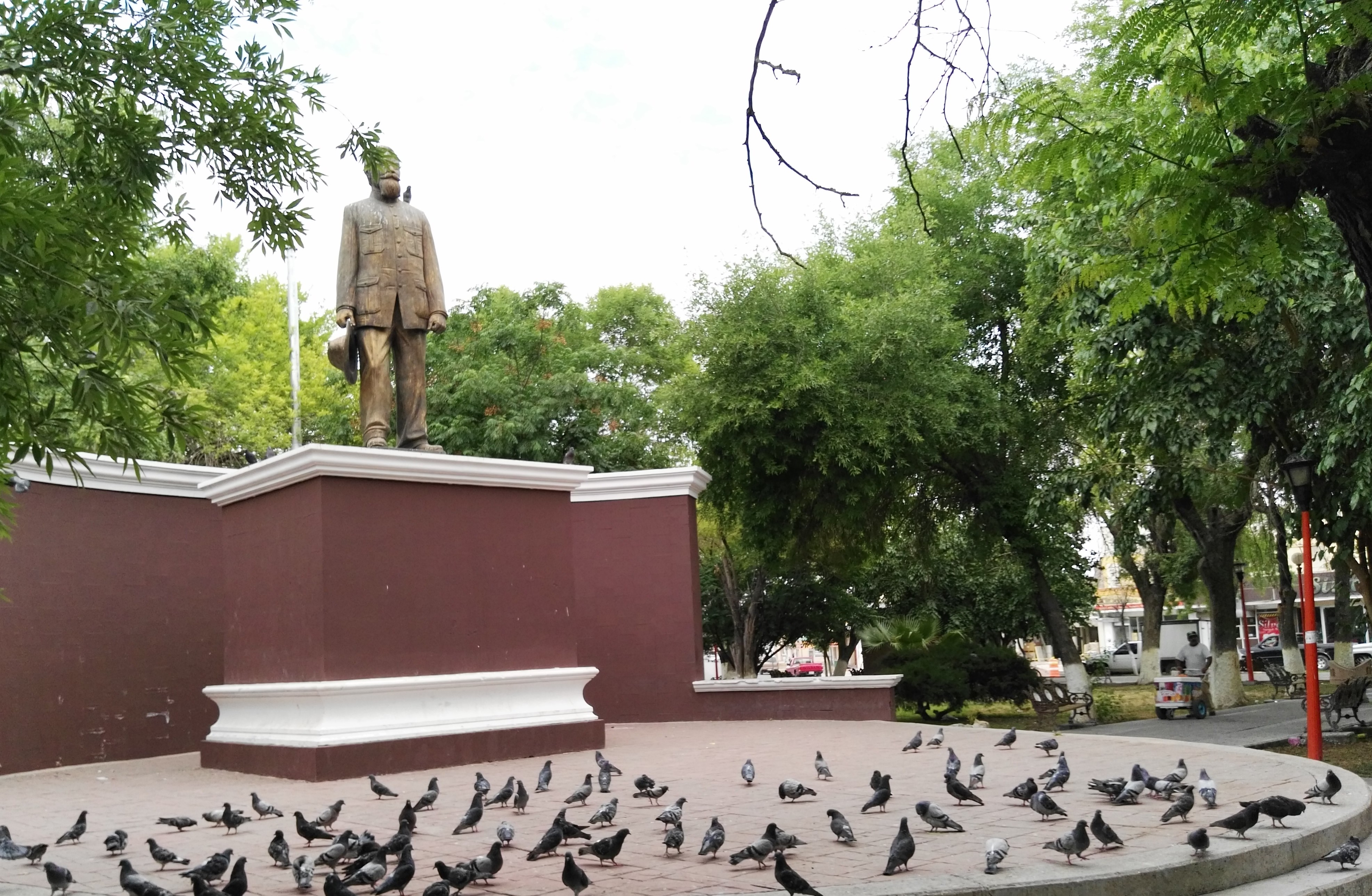 Plaza Carranza.